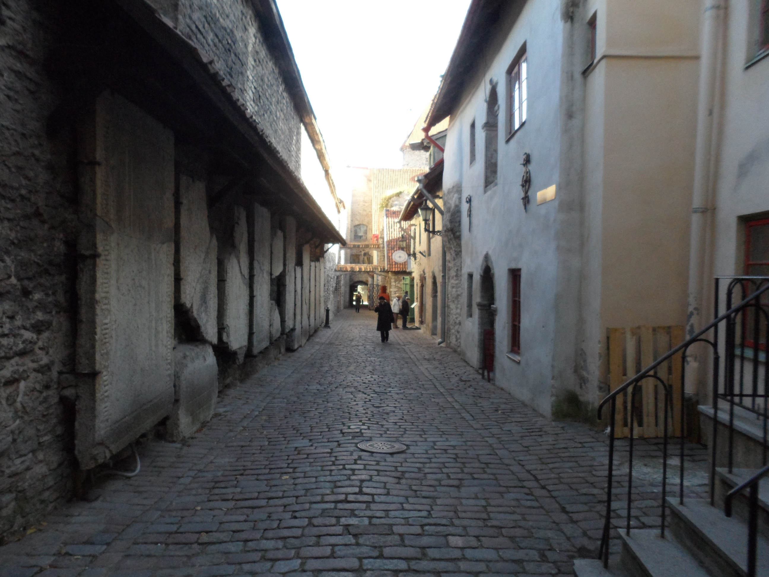 проход Катарины